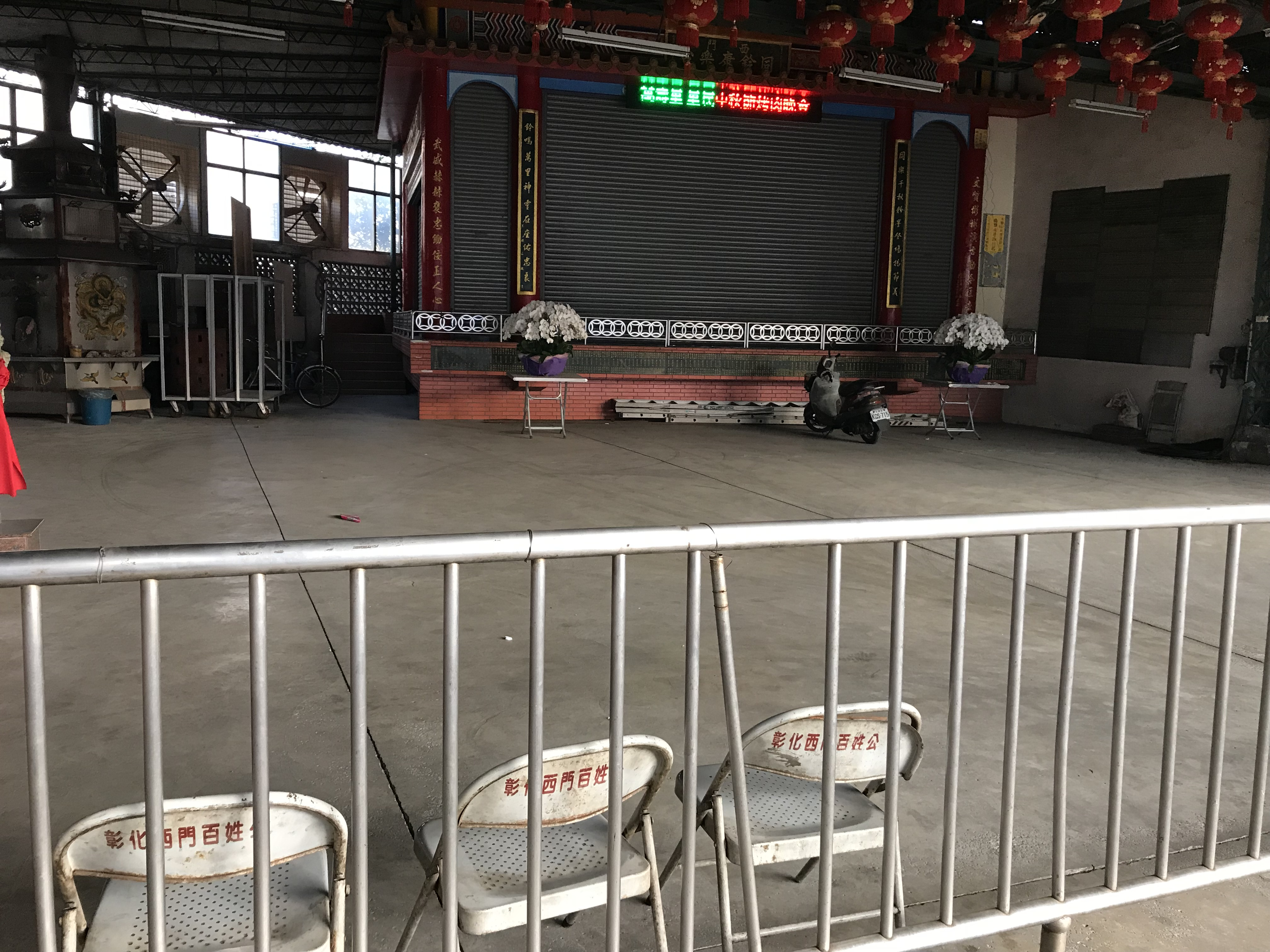 西門百姓公廟戲台